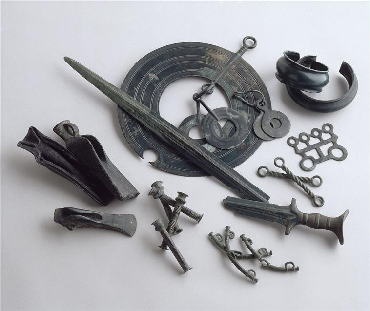 Ausschnitt Depot de vaudrevanges (Quelle: Musée d'Archéologie Nationale in Paris St. Germain en laye)